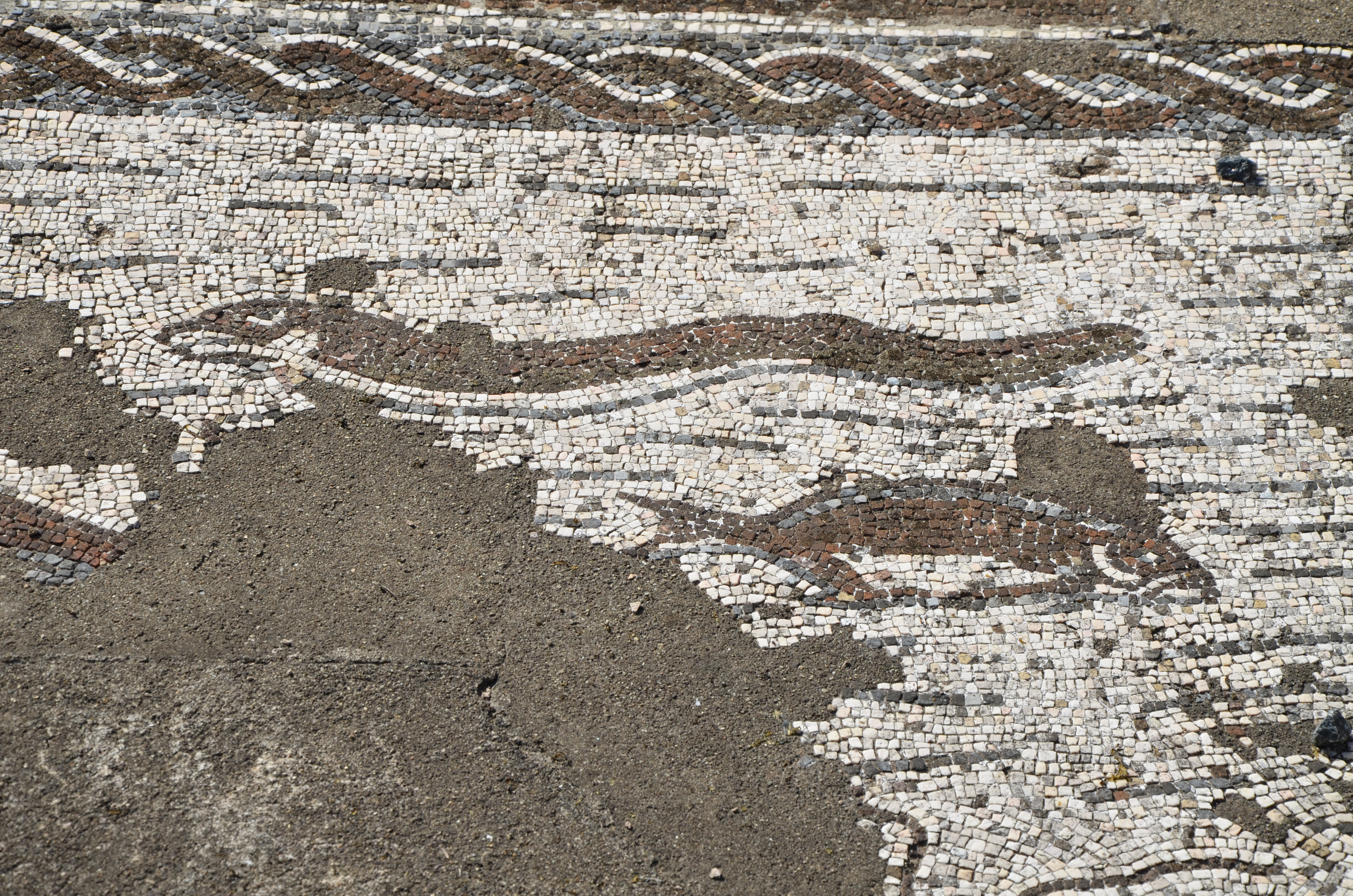 Mosaic floor, Roman Villa of Pisões, Lusitania, Portugal